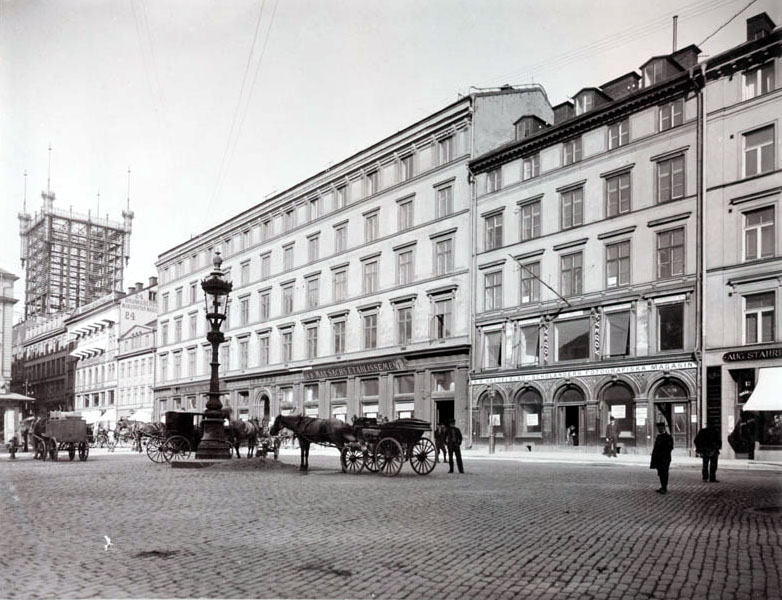 Brunkebergstorg med telefontornet i bakgrunden Foto Nyckelord Plats: Fd kvarteret ÅSKSLAGET. Brunkebergstorg. Norrmalm. Tid: 26 april 1906 Ämne: Hästfordon. Torg. Telefonstationer. Gatubelysning. Gatlyktor. Referenser Upphov: Larssons Ateljé. Tid: 26 april 1906 Beteckning: Fotonummer C 531